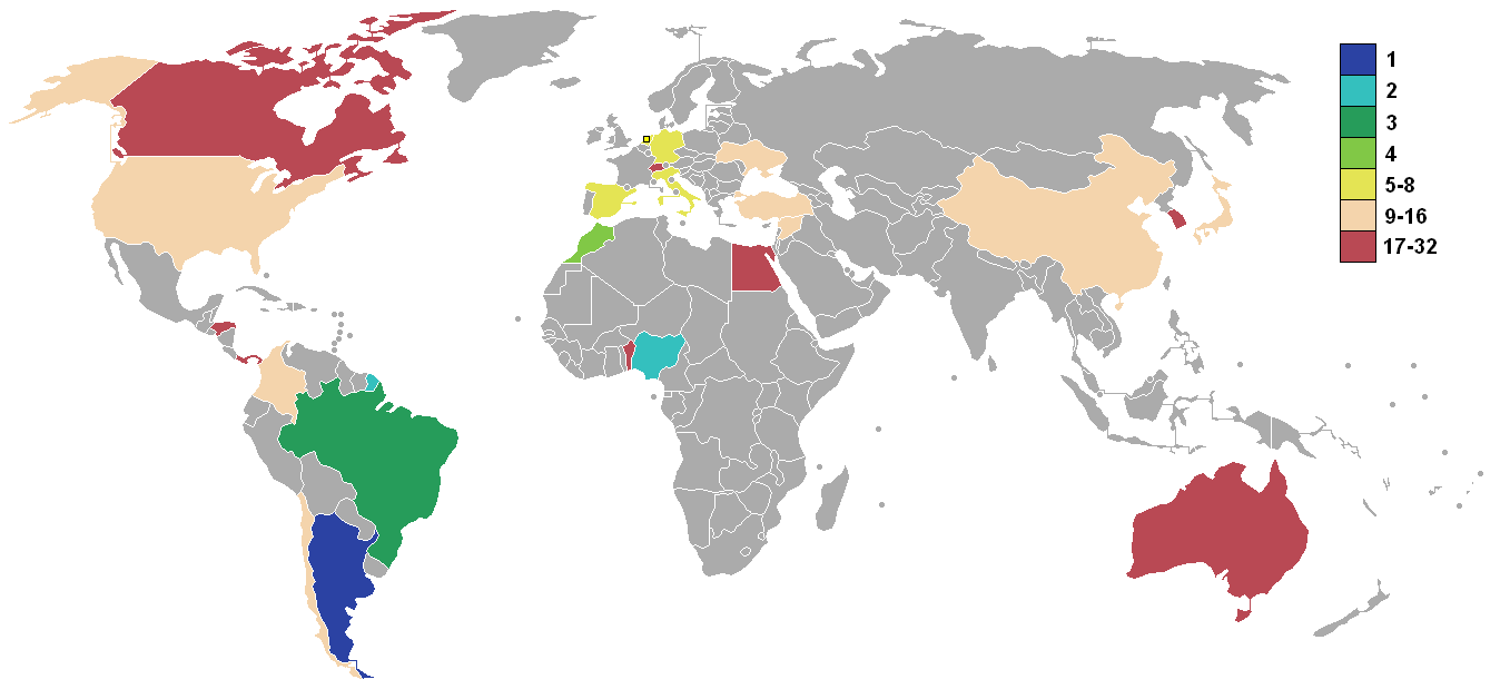 Copa disputada en Países Bajos